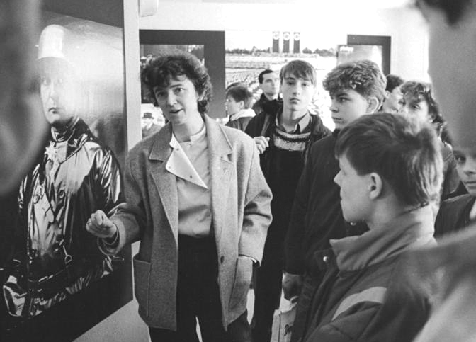 Fürstenberg, Jugendstunde in der Gedenkstätte Ravensbrück ADN-ZB Grimm 19.5.88 Bez. Neubrandenburg: Jugendstunde. Mit dem Ursprung und der Entwiclung des Faschismus in Deutschland machten sich 28 Jungen und Mädchen der Klasse 8b der Friedrich-Wolf-Oberschule der Bezirksstadt während einer Jugendstunde in der Nationalen Mahn- und Gedenkstätte Ravensbrück vertraut. In einer Ausstellung machen zahlreiche Fotos und andere Sachzeugen diesen Teil deutscher Geschichte den Schülern anschaulich.